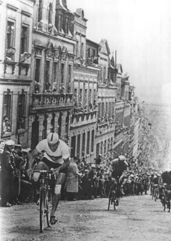 Friedensfahrt, Chemnitz, Stadtdurchfahrt Zentralbild Wendorf. Tr.Schä.11.5.1961.XIV. Internationale Friedensfahrt Warschau–Berlin–Prag 1961. 9.Etappe von Leipzig nach Karl-Marx-Stadt (mit Zeitfahren) am 11.5.1961. UBz: Die steile Wand von Meraene – Schrecken vieler Radfahrer - verlangte auch diesmal den Aktiven alles ab. Mit einigen Metern Vorsprung gewann Manfred Weissleder (vorn) die Bergprämie.